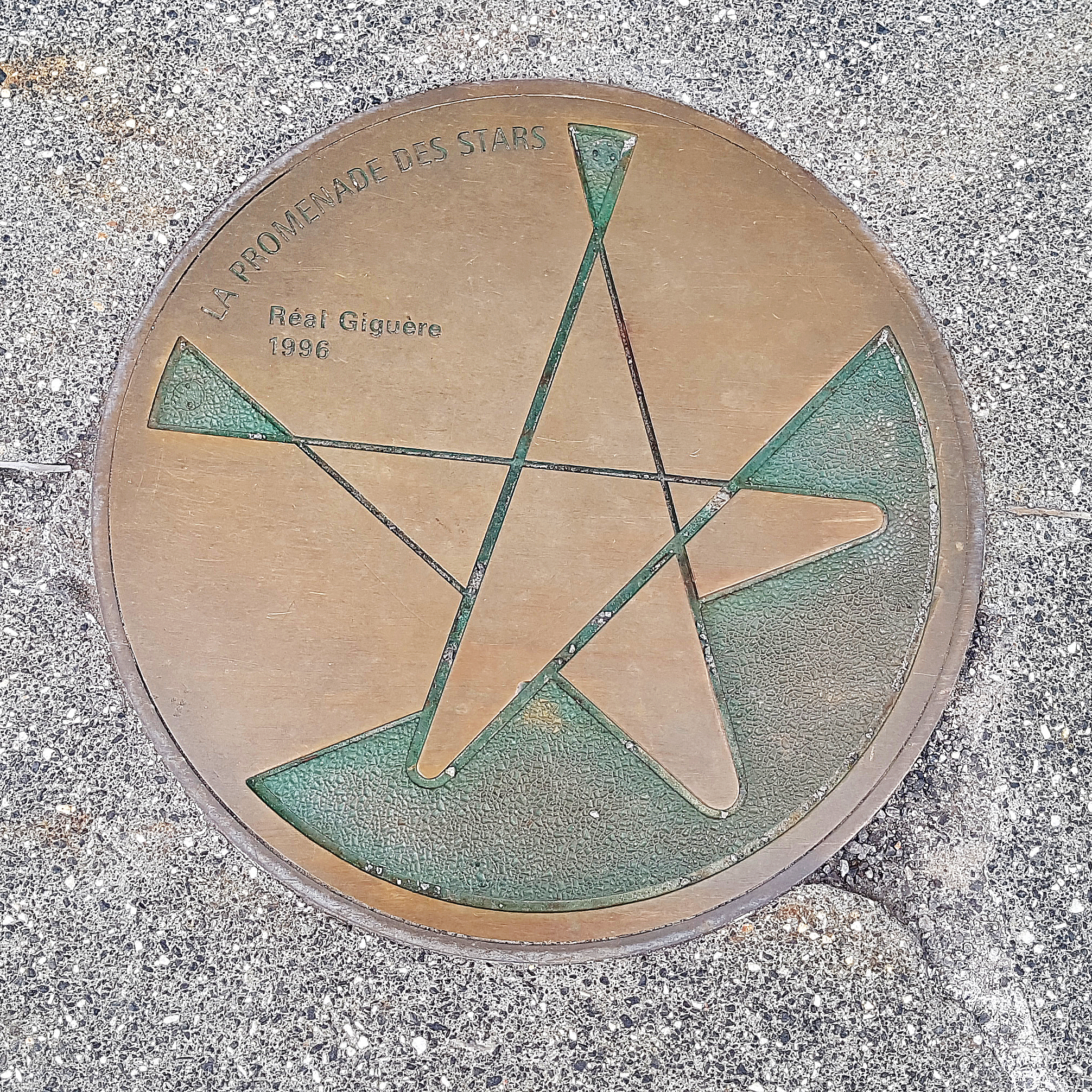 Réal Giguère 1996 - La promenade des stars TVA, rue Alexandre-de-Sève, Montréal, 17 mai 2017.